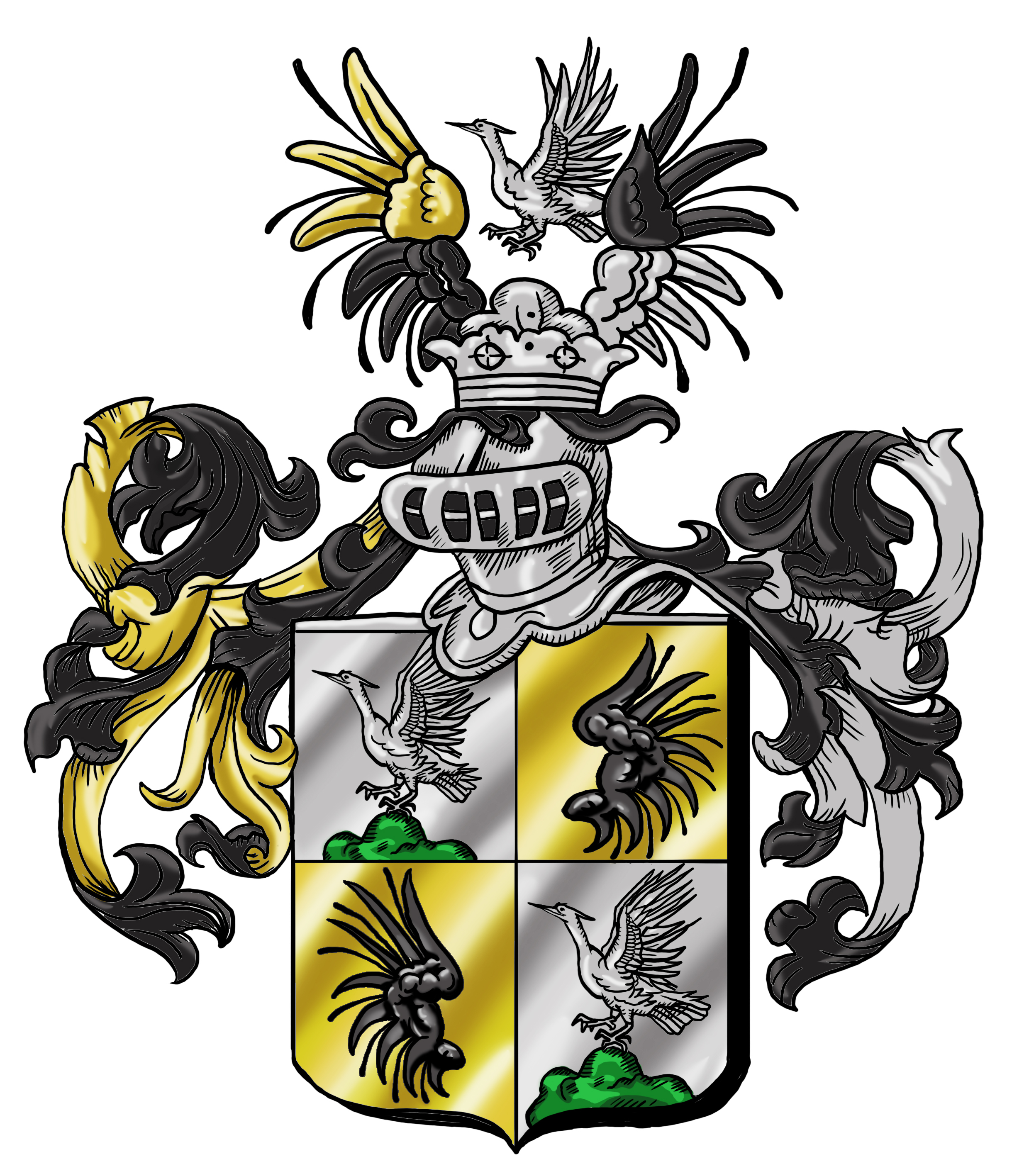 Wappen der Familie von Grauvogl